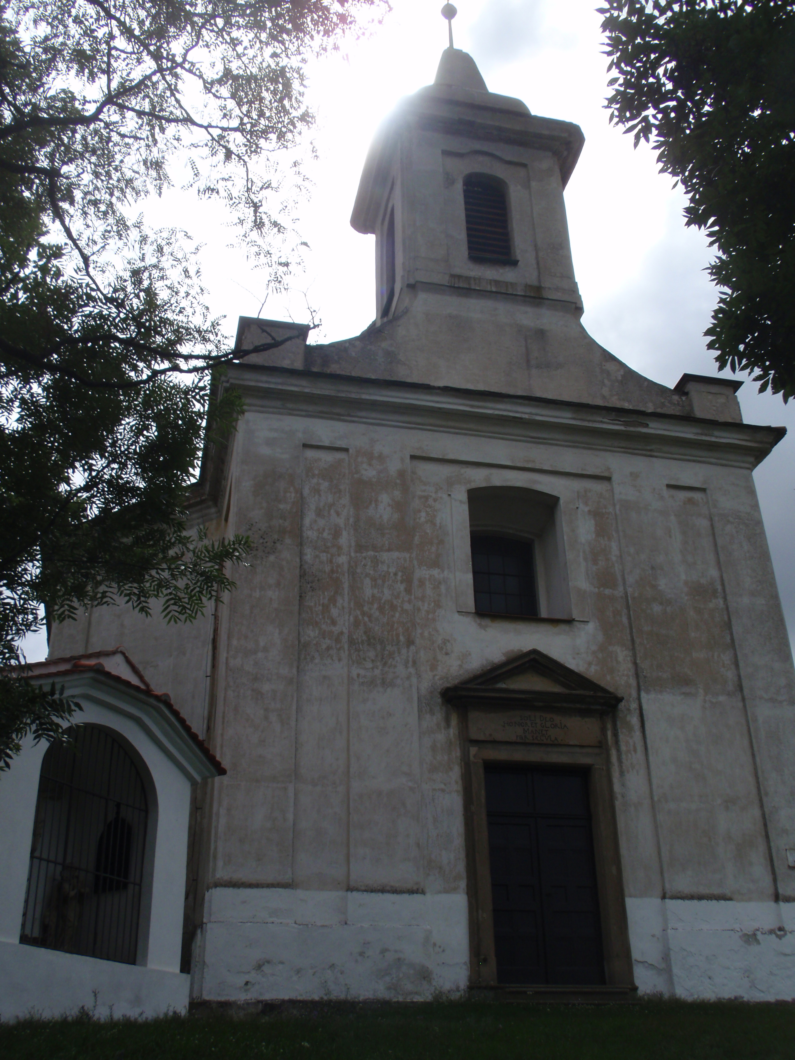 Kaple sv. Antonína Paduánského a sv. Floriána se souborem křížové cesty (Dolní Kounice), Dolní Kounice